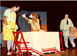 rf